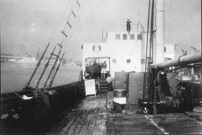 אוניית המעפילים טירת צבי